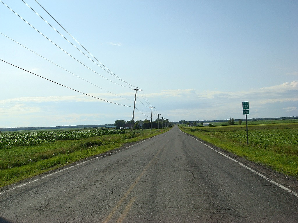 Photo de la route 143, à Saint-Bonaventure, Québec, Canada.